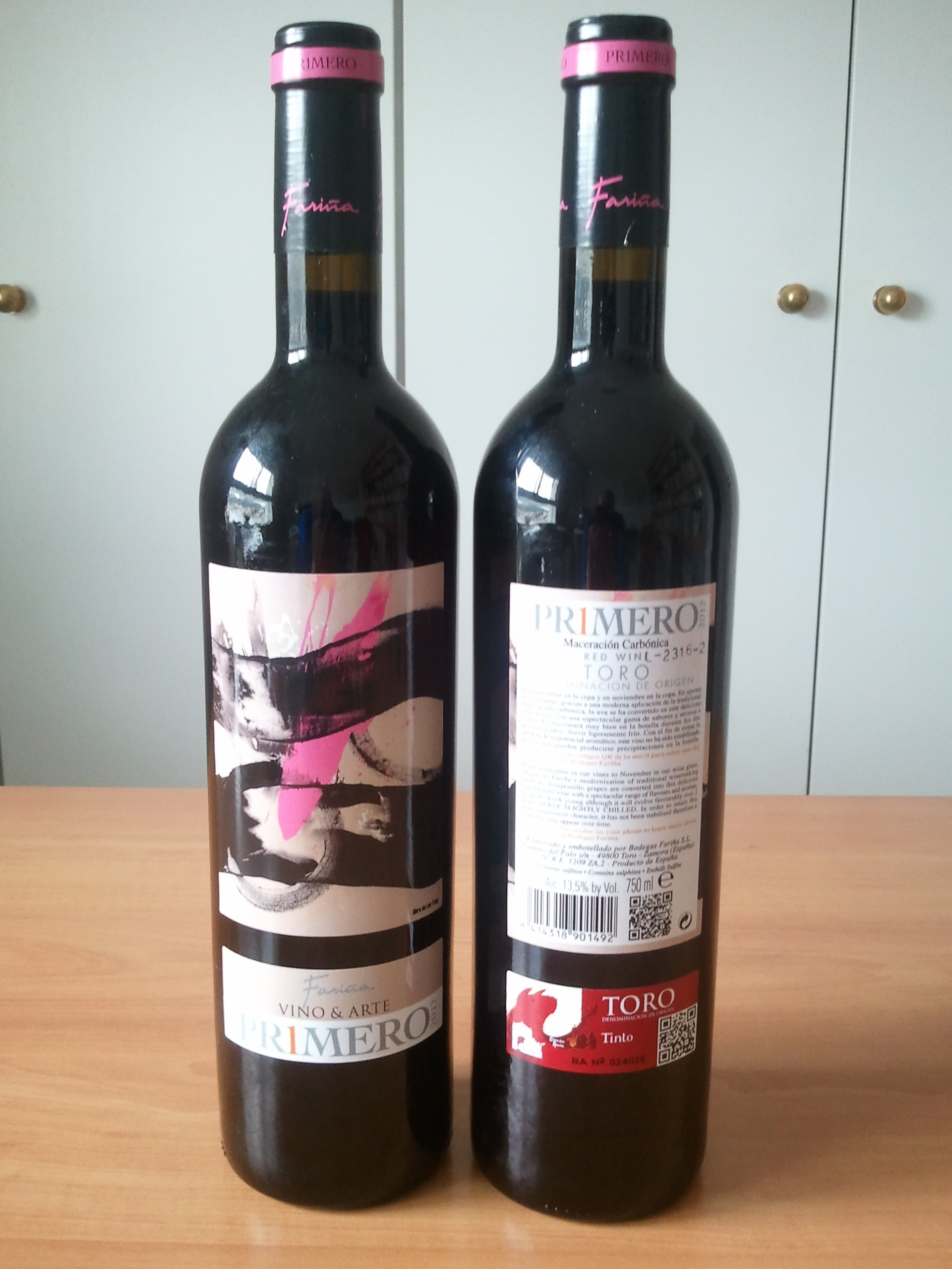 Zwei Flaschen Vino Toro Primero, (2012), Spanien